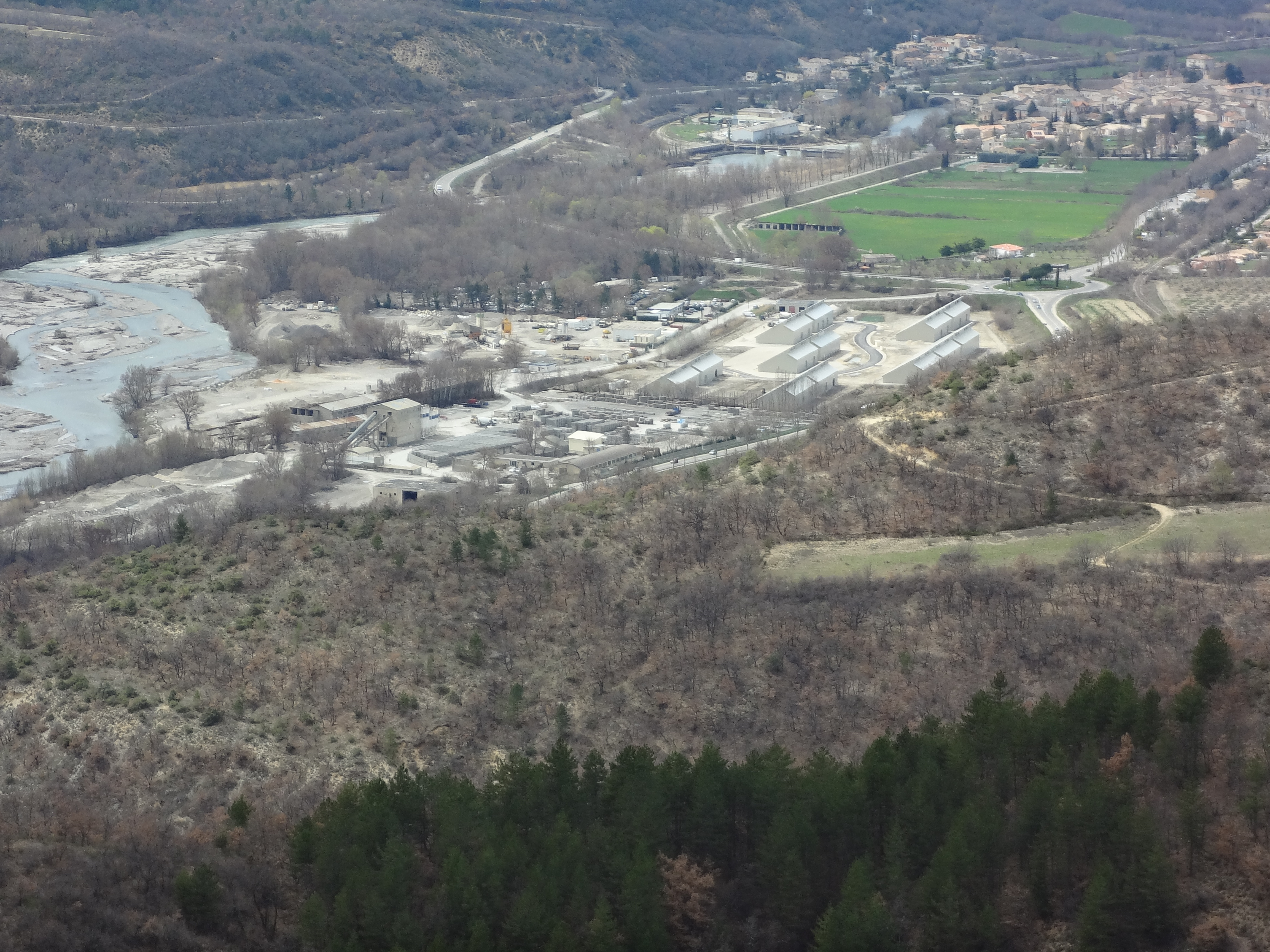 Vue de Malijai, vallée de la Bléone, de la colline Saint-Philippe à Mirabeau. On distingue au premier plan la zone artisanale des Iscles et la sablière dans le cours de la Bléone